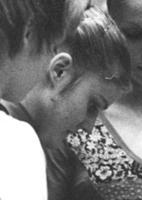 ADN-ZB Schaar 21.3.76 Suhl: DDR-Meisterschaften der Turnerinnen - Bei der Vorbereitung auf den Wettkampf: Steffi Kräker, Marion Kische, Gitta Escher, Ricarda Schmeißer und Angelika Hellmann (vlnr). Die Hallenserin Gitta Escher ging aus den DDR-Meisterschaften, die am 20.3.76 zu Ende gingen, als die erfolgreichste Teilnehmerin hervor. Nach ihrem Erfolg im Mehrkampf holte sie sich auch den Titel auf dem Schwebebalken und im Bodenturnen. Am Stufenbarren gewann Marion Kische.